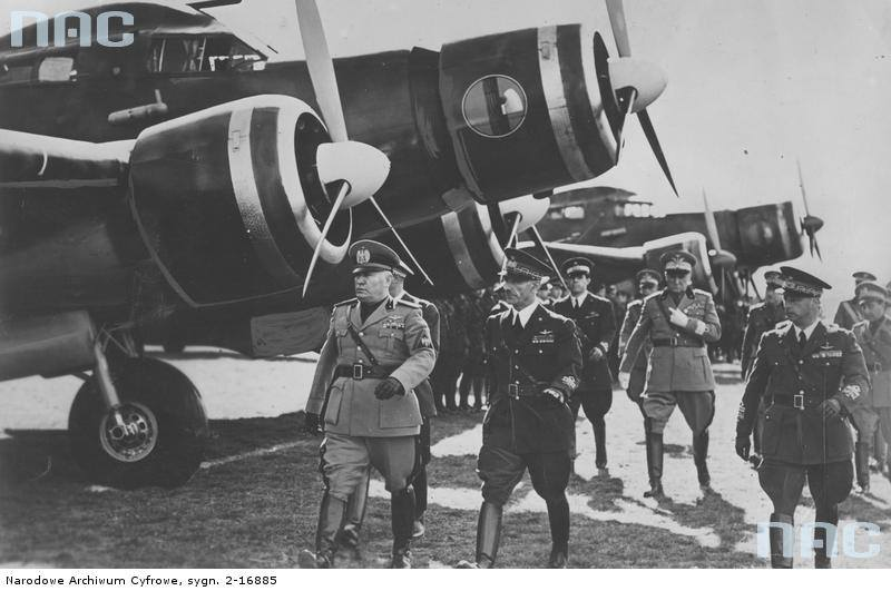 Savoia-Marchetti SM.79 Mussolini